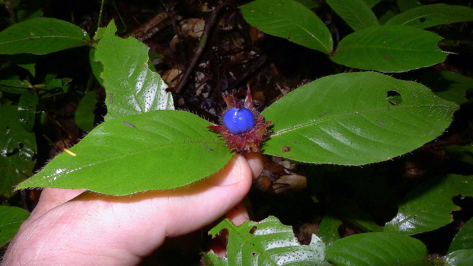 Psychotria iodotricha Muell. Arg.